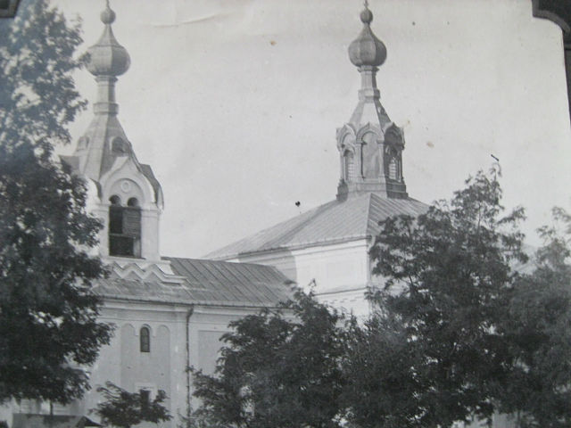 Czerniczyn - dawna cerkiew pw. Wszystkich Świętych, lata 30. XX wieku, obecnie kościół rzymskokatolicki pw. św. Jana Chrzciciela